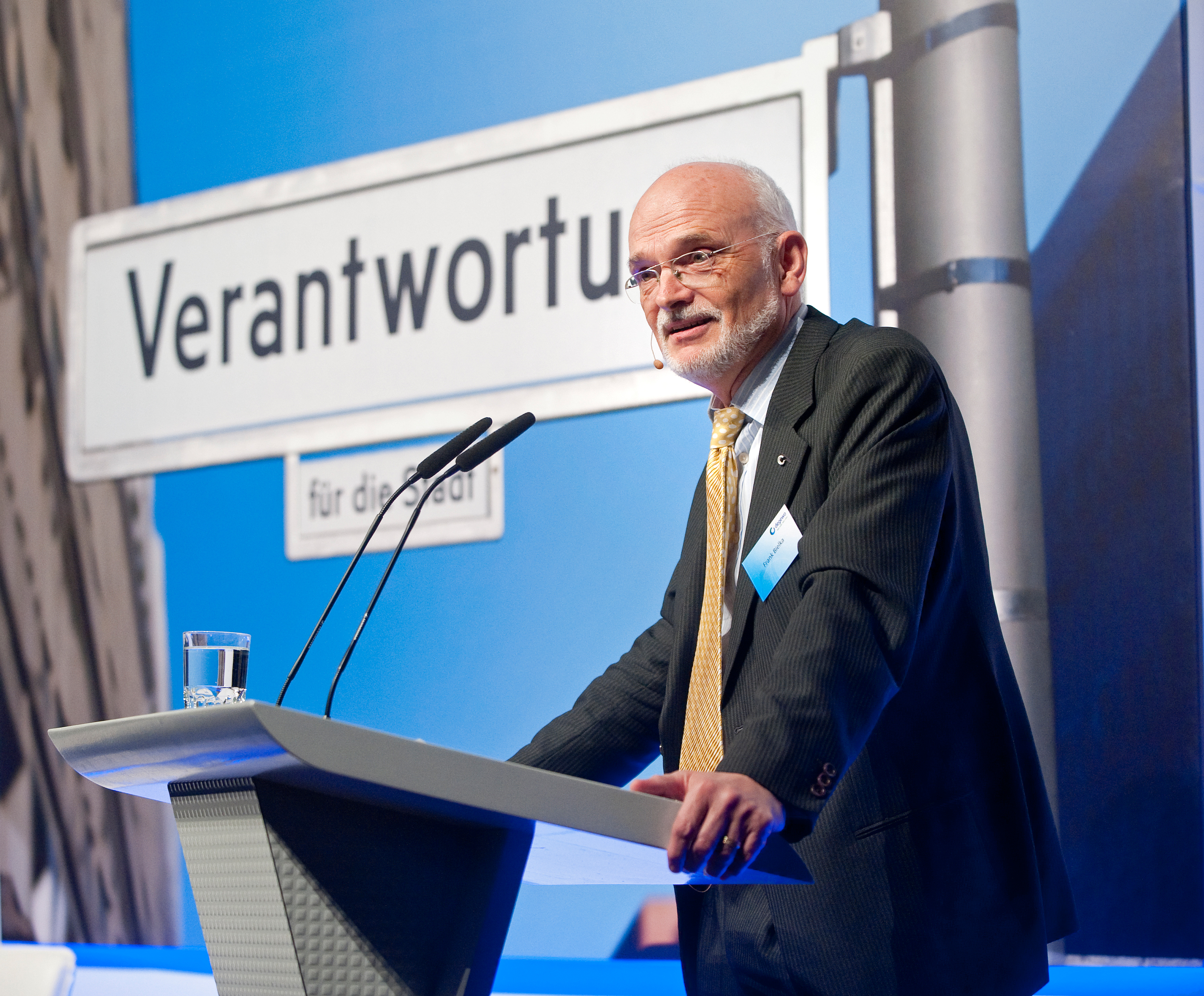 Frank Bielka Mitglied des Vorstands der degewo